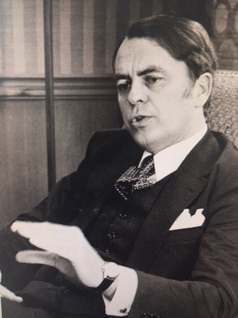 Bo rydin